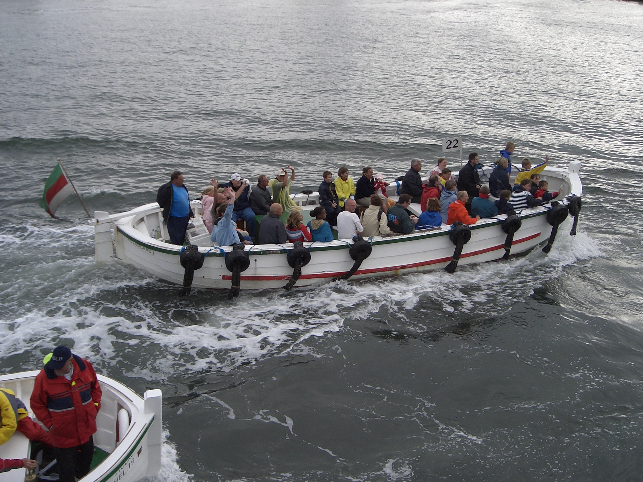 Börteboot voll besetzt, volle fahrt gen Helgoland